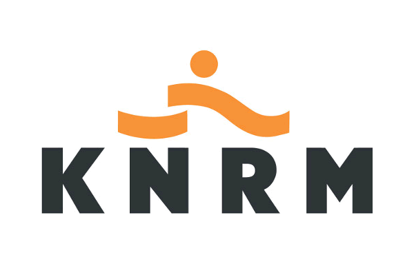 Logo der Koninklijke Nederlandse Redding Maatschappij (KNRM)